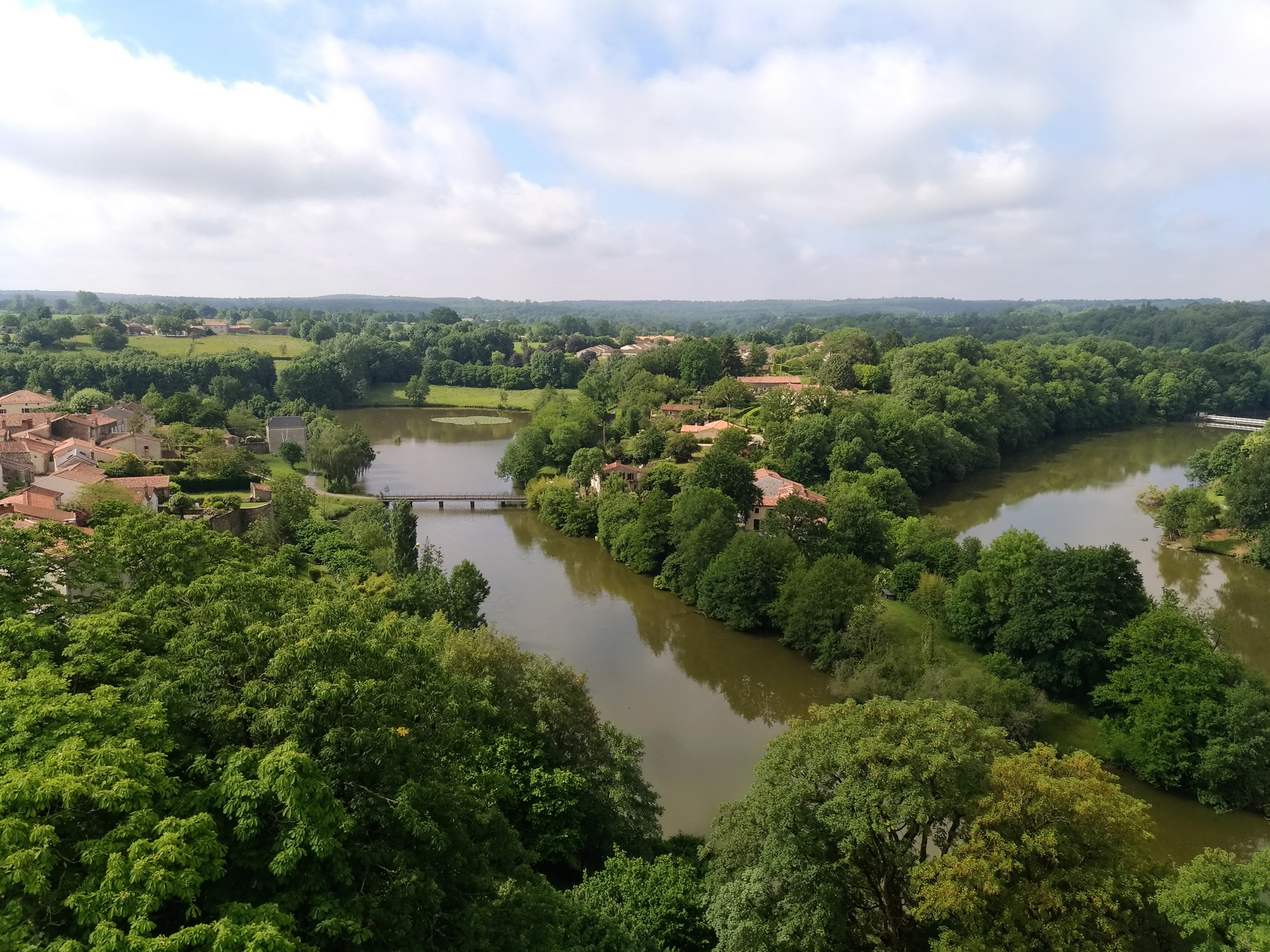 Au centre, méandre entouré par la rivière Mère, site du premier château construit avant 1016-1019 par Guillaume V d'Aquitaine, duc d'Aquitaine et comte de Poitiers. Photographie prise depuis le haut de la tour Mélusine.